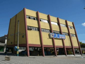 Foto da Câmara Municipal de São Benedito